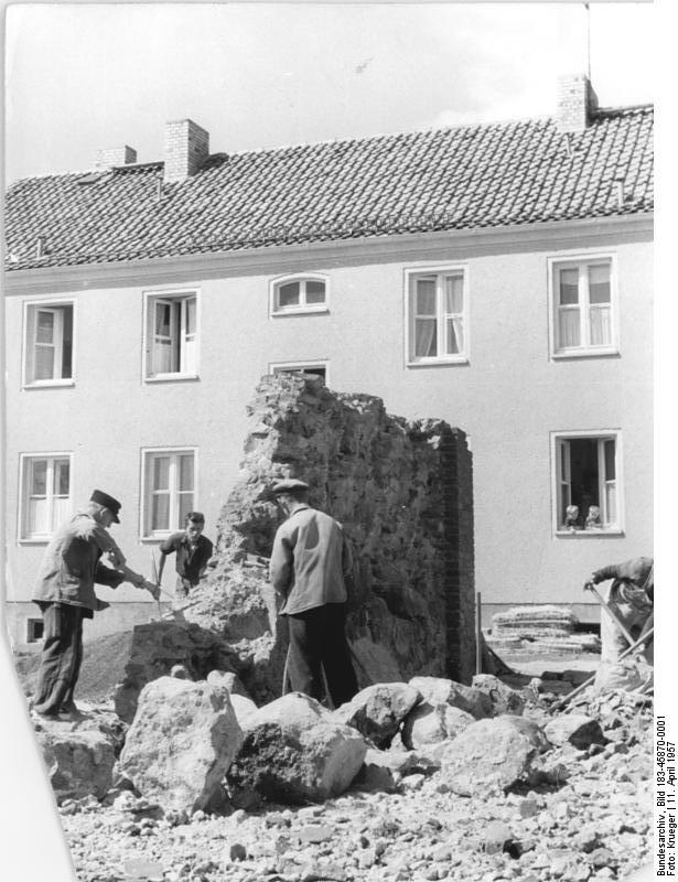 Markendorf, Abriss einer alten Scheune Zentralbild Krueger Wo-Noa 11.4.1957 Zur Vorbereitung der Wahlen - Das Alte muß dem Neuen weichen. Das ehemalige Rittergut Markendorf Bezirk Frankfurt-Oder, auf dem die v. Burgsdorfs herrschten und die Menschen ausbeuteten, um größtmöglichste Profite einzuheimsen, wird heute von der LPG Einigkeit verwaltet und bearbeitet. Wo ehemals alte Gutsscheunen standen, baut die MTS Frankfurt-Oder für ihre Mitarbeiter neue Häuser mit schönen hellen geräumigen Wohnungen. UBz: Die letzte Mauer einer alten Gutsscheune muß fallen, um den neuen Wohnhäusern Platz zu machen.